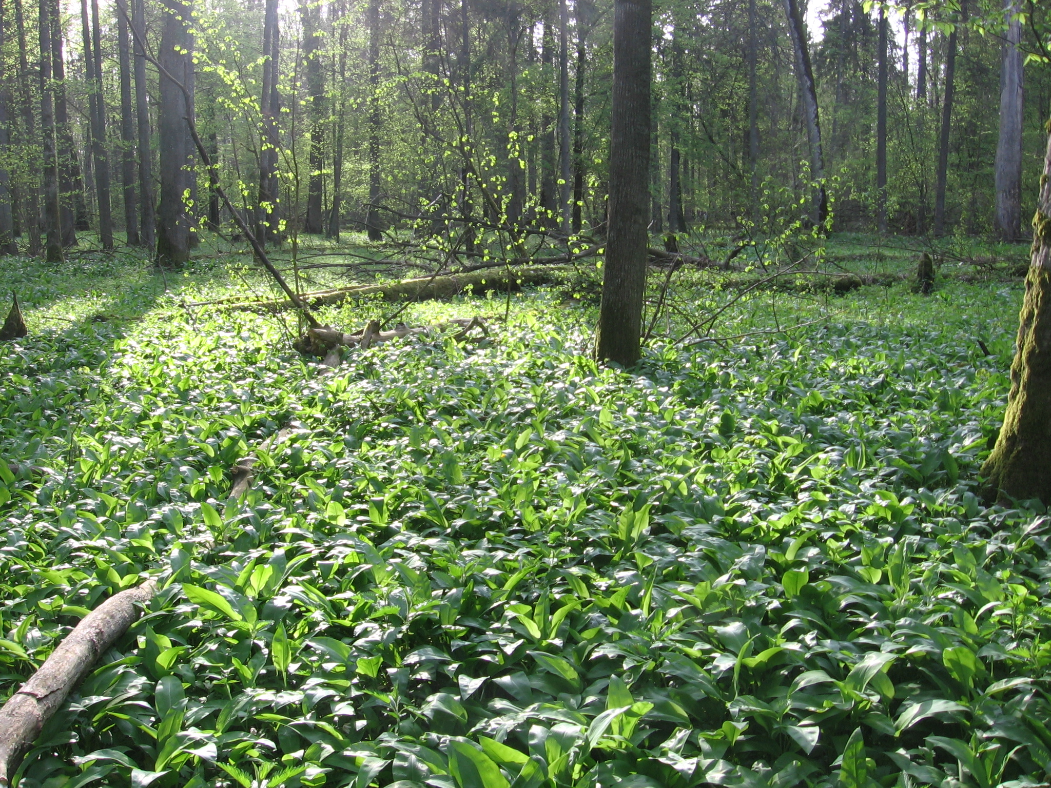 Czosnek niedźwiedzi Allium ursinum w Puszczy Białowieskiej.